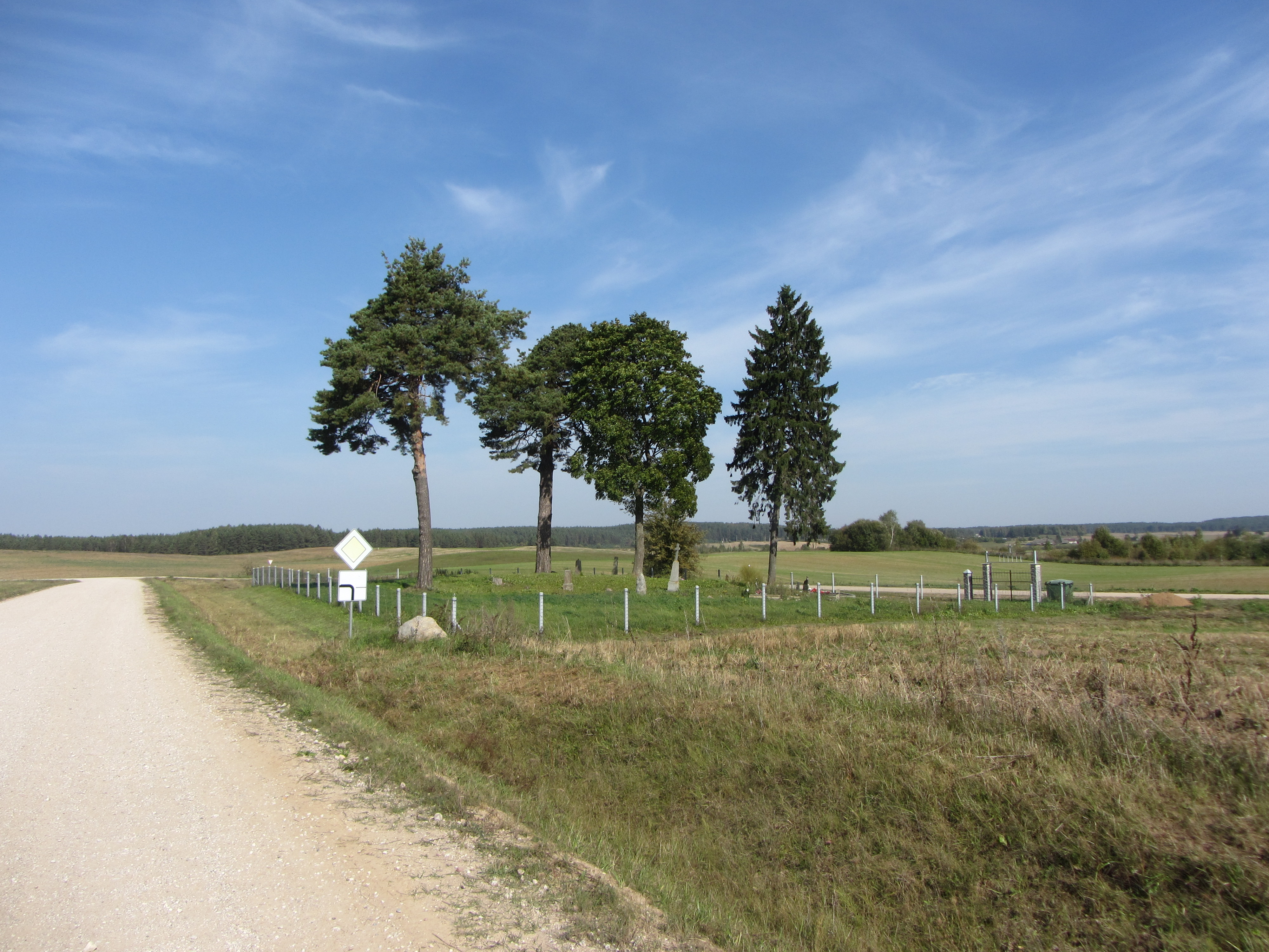 Tolkūnai 65387, Lithuania